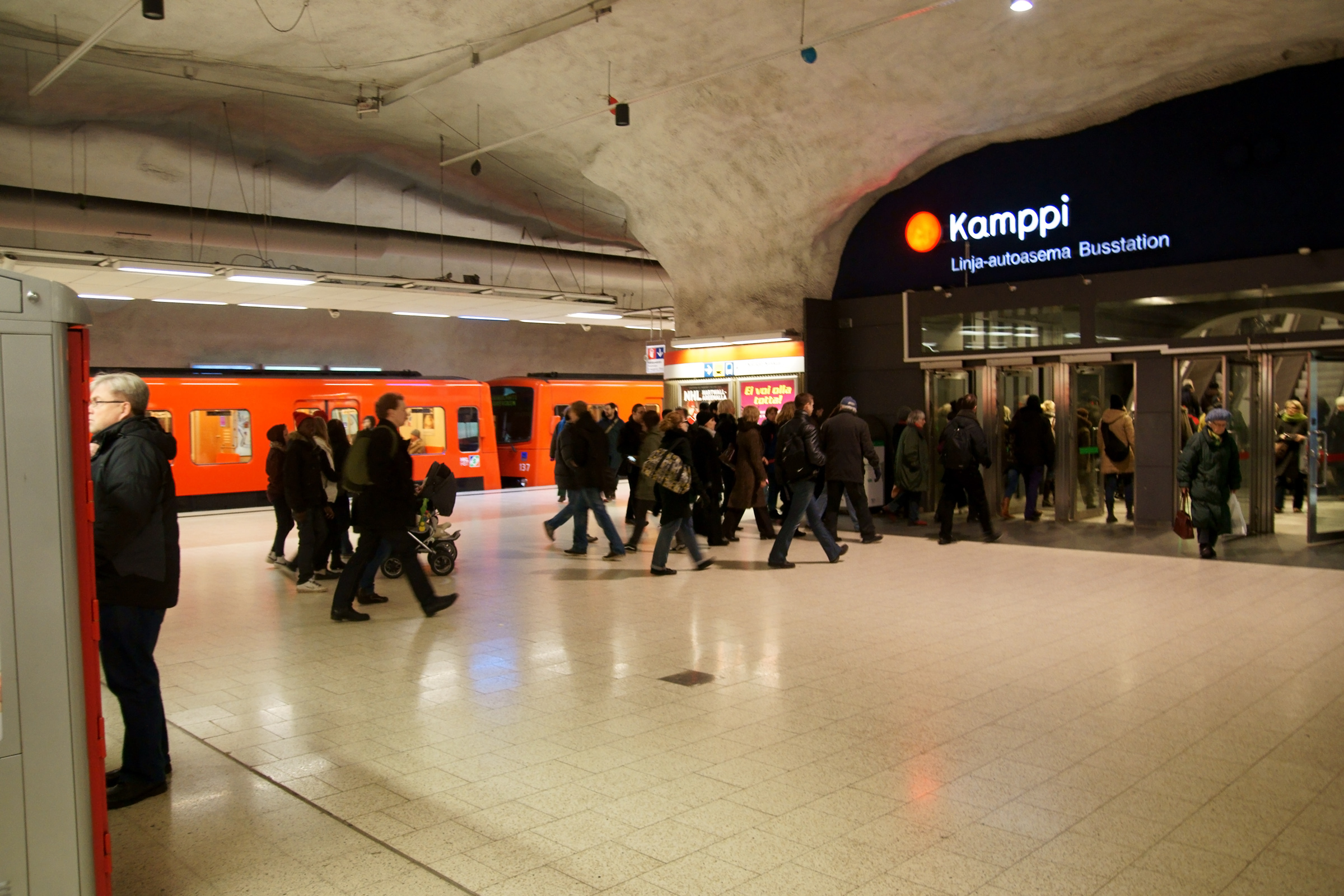 Kampin metroasema.